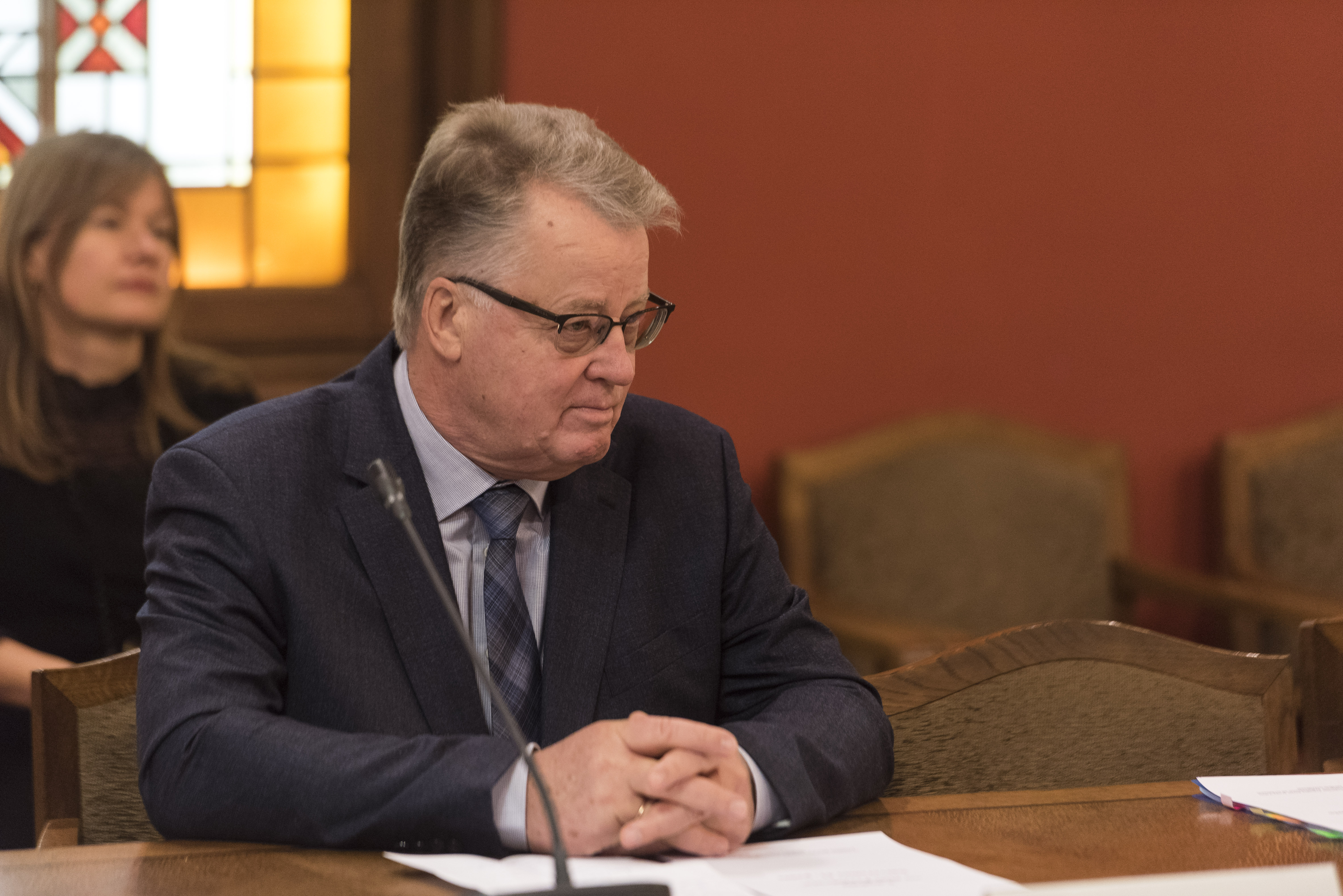 2015.gada 15.decembris. Juridiskās komisijas darba grupas Valsts prezidenta pilnvaru iespējamai paplašināšanai un ievēlēšanas kārtības izvērtēšanai sēde. Foto: Reinis Inkēns, Saeimas Administrācija Izmantošanas noteikumi: saeima.lv/lv/autortiesibas